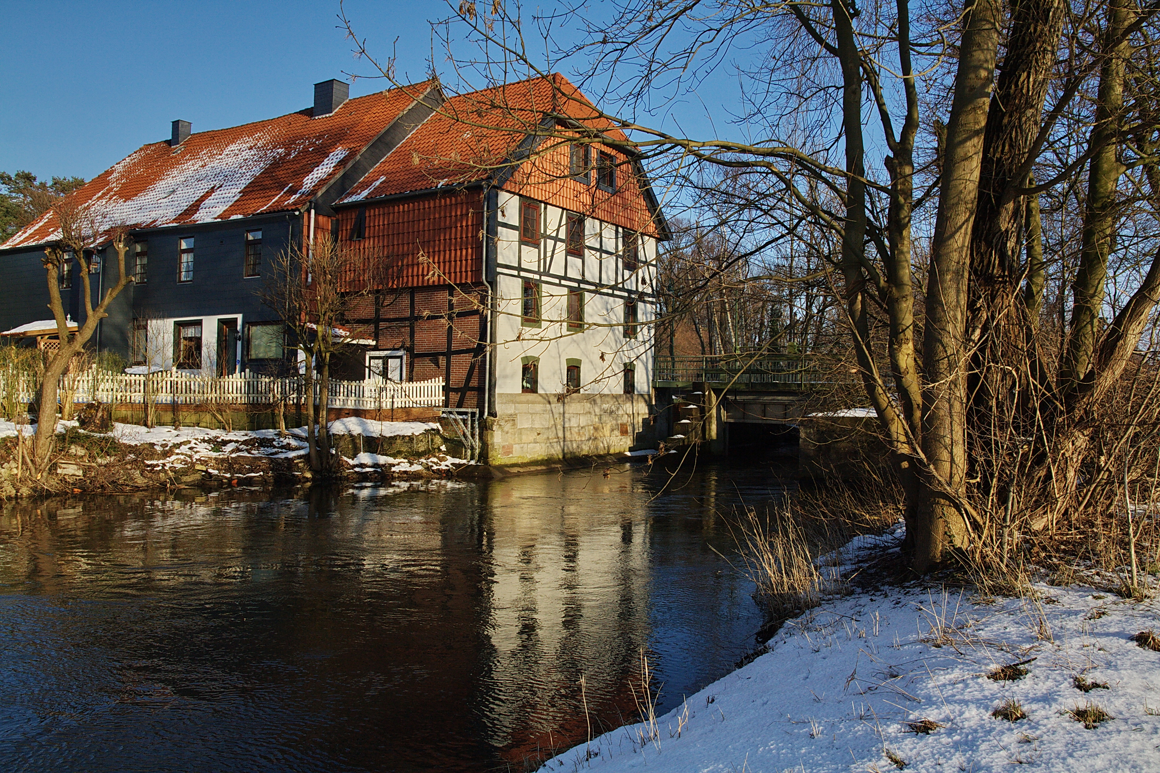 Berger Wassermühle an der Fuhse in Eixe (Peine), Niedersachsen, Deutschland